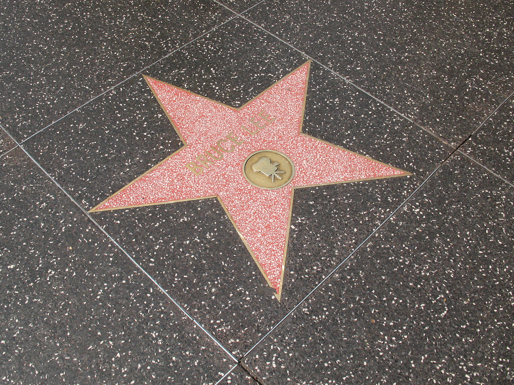 Bruce Lee的星星.